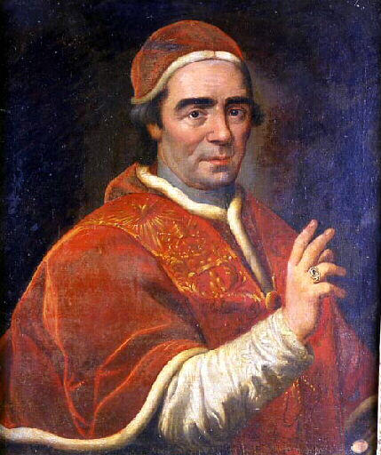 Portrait du pape Clément XIV Ganganelli